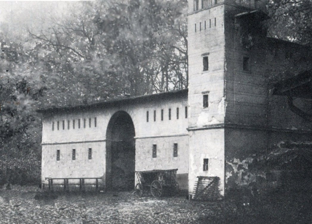 Park Klein-Glienicke, Kuh- und Wirtsschaftspferdestall vor dem Einbau der Wohnungen, Fotomontage unter Verwendung eines Fotos um 1932